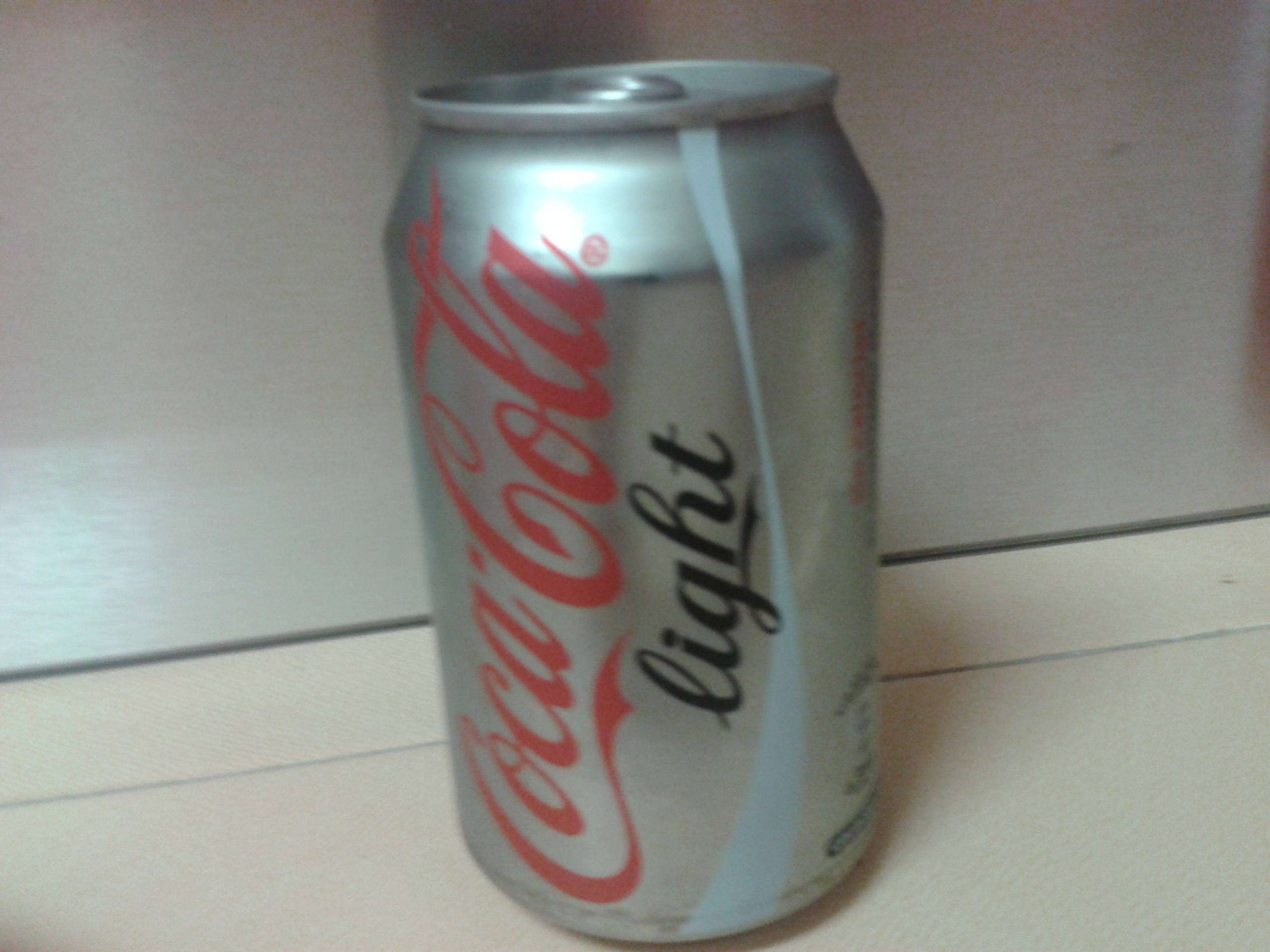 Coca Cola Light